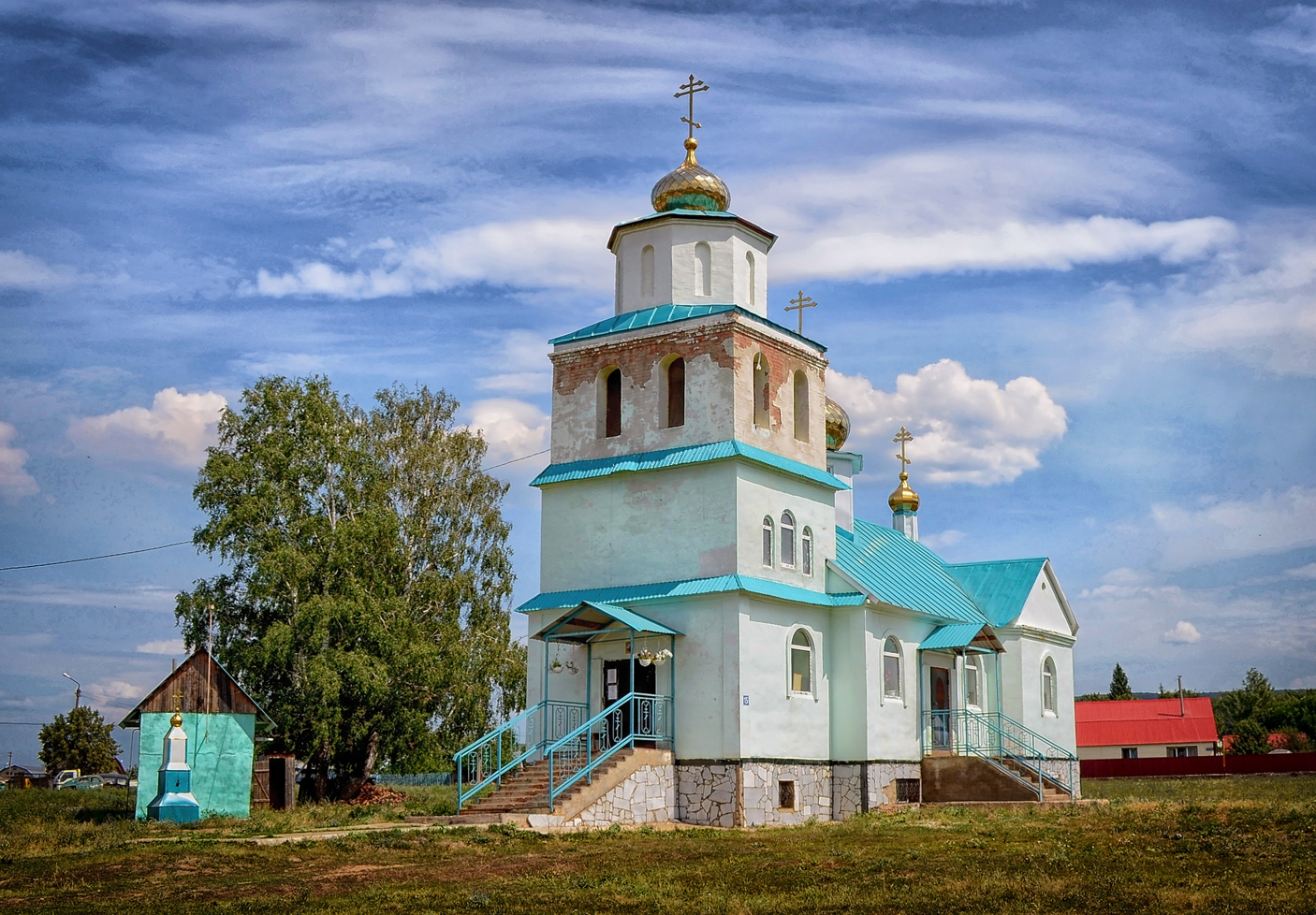 Церковь в честь Святой Варвары Скворчихинской